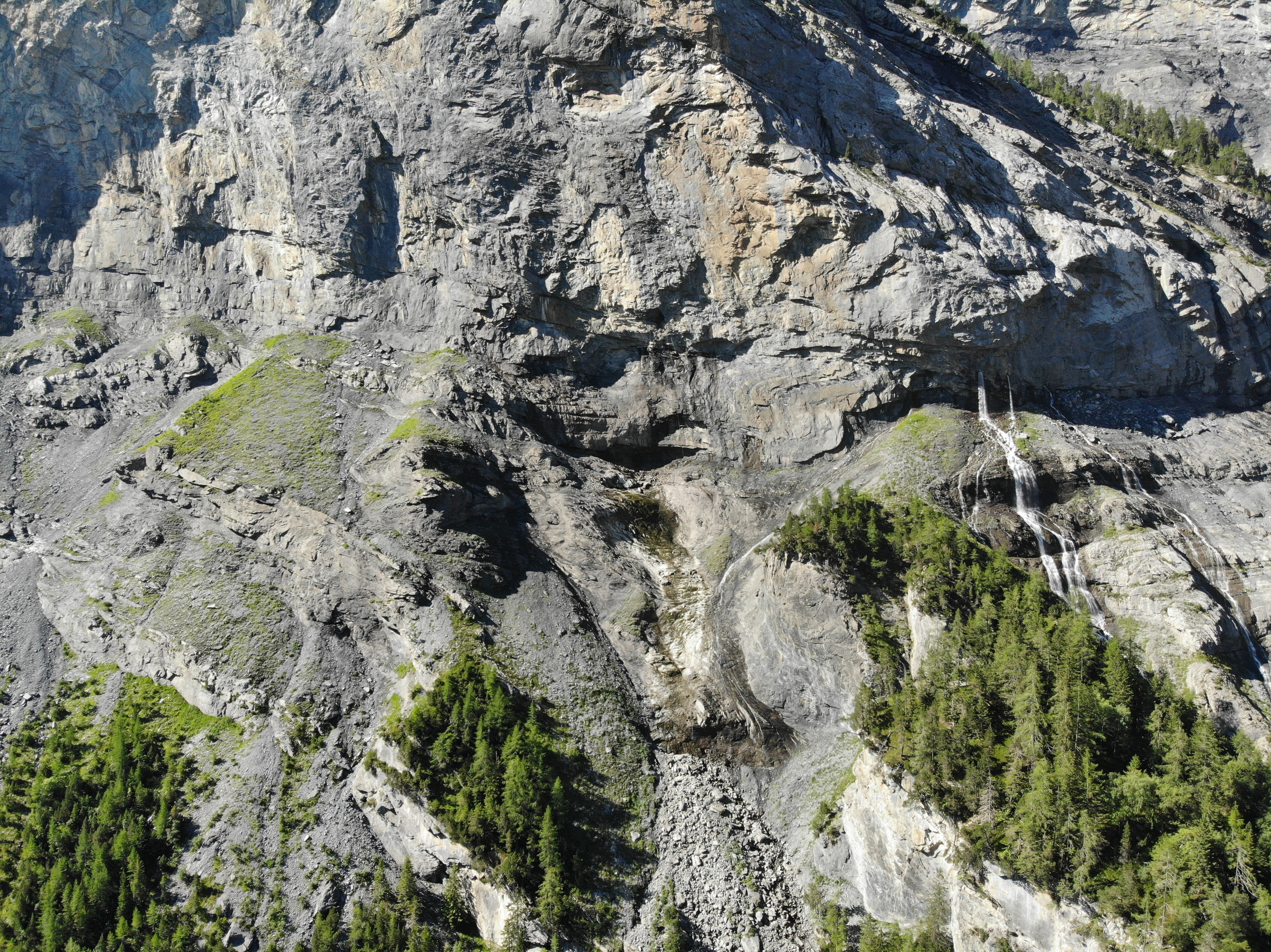 Im Gasterntal: Heimritz